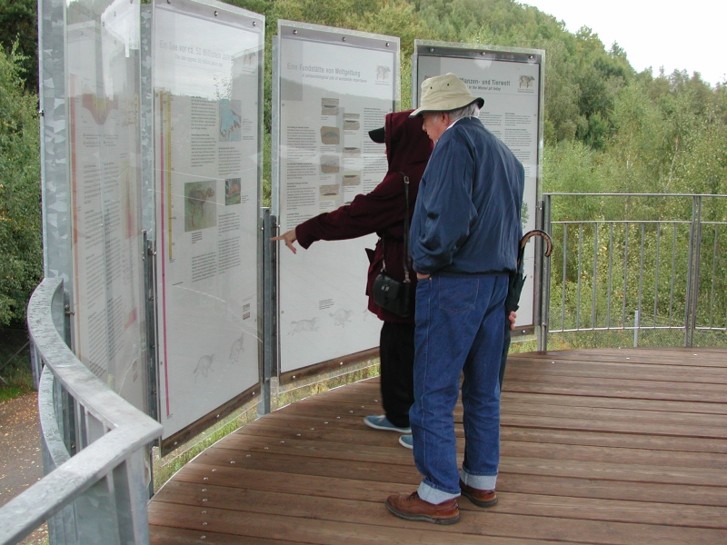 Grube Messel, Germany